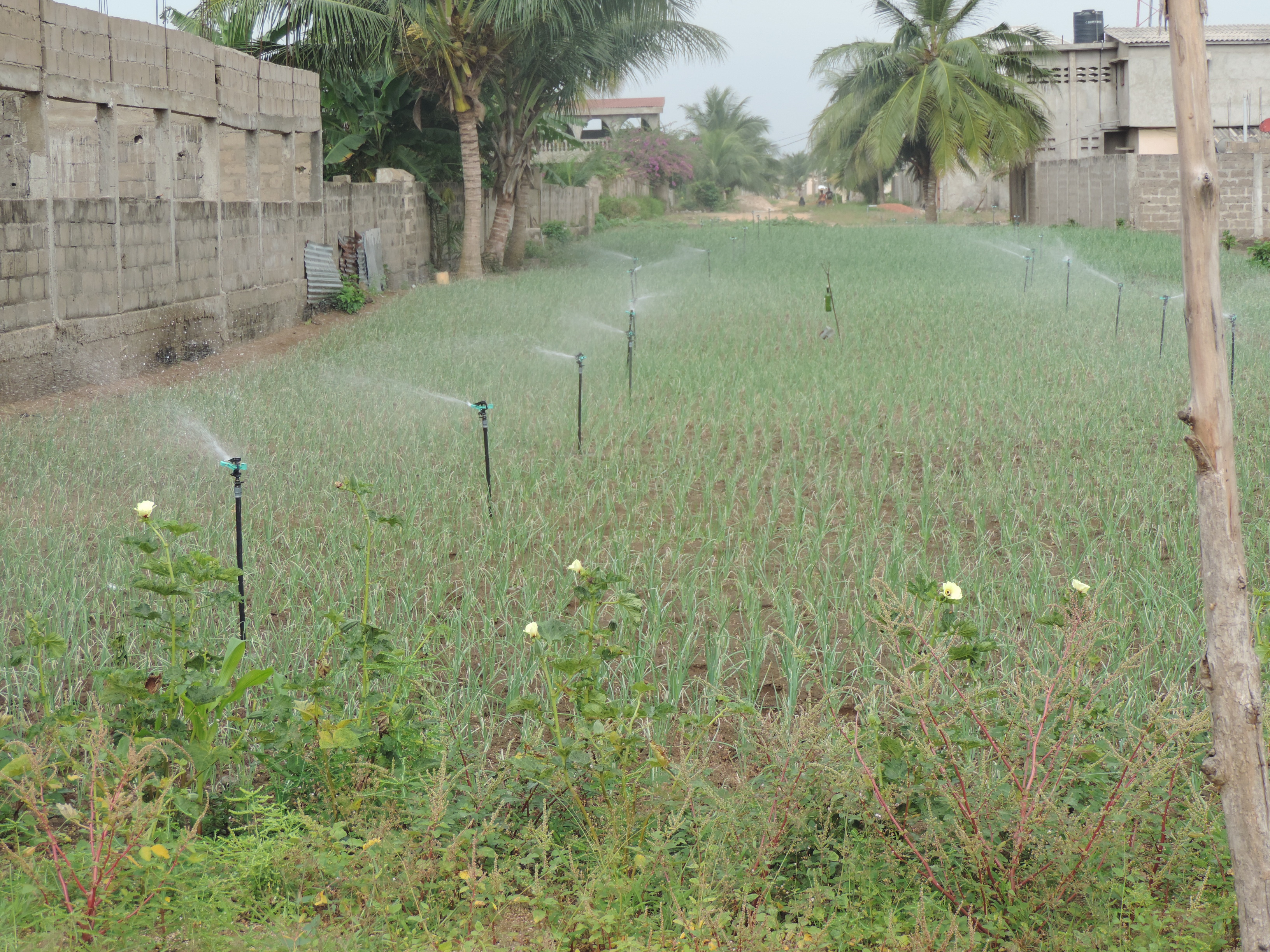 Culture maraîchère irriguée, Aného, Togo 2017.